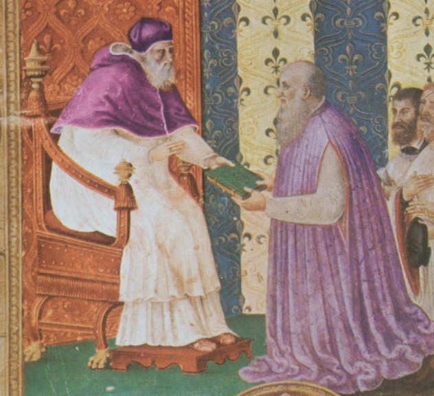 Widmungsbild: der Kapellmeister und Bischof von Assisi Ludovico Magnasco di Santa Fiora übergibt Papst Paul III. das Exemplar der Konstitutionen der Cappella Sistina